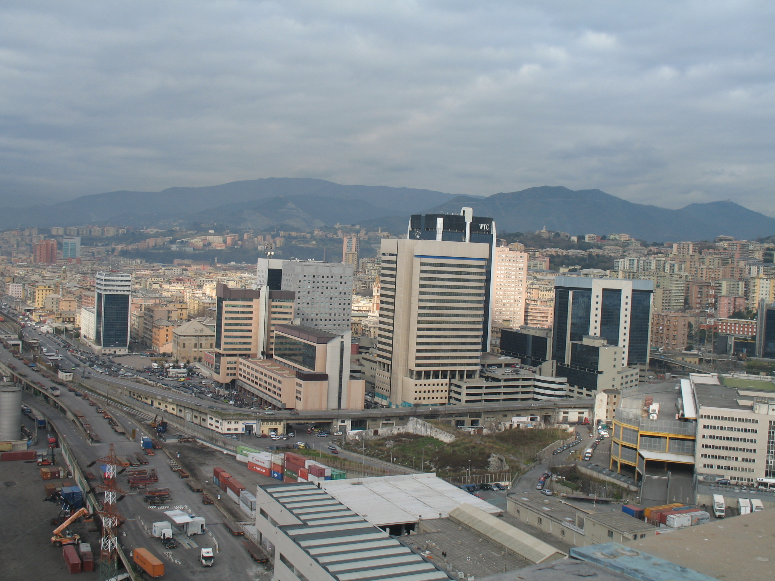 Immagine dal Porto di Genova (terminal, moli, container, calate, ecc.)